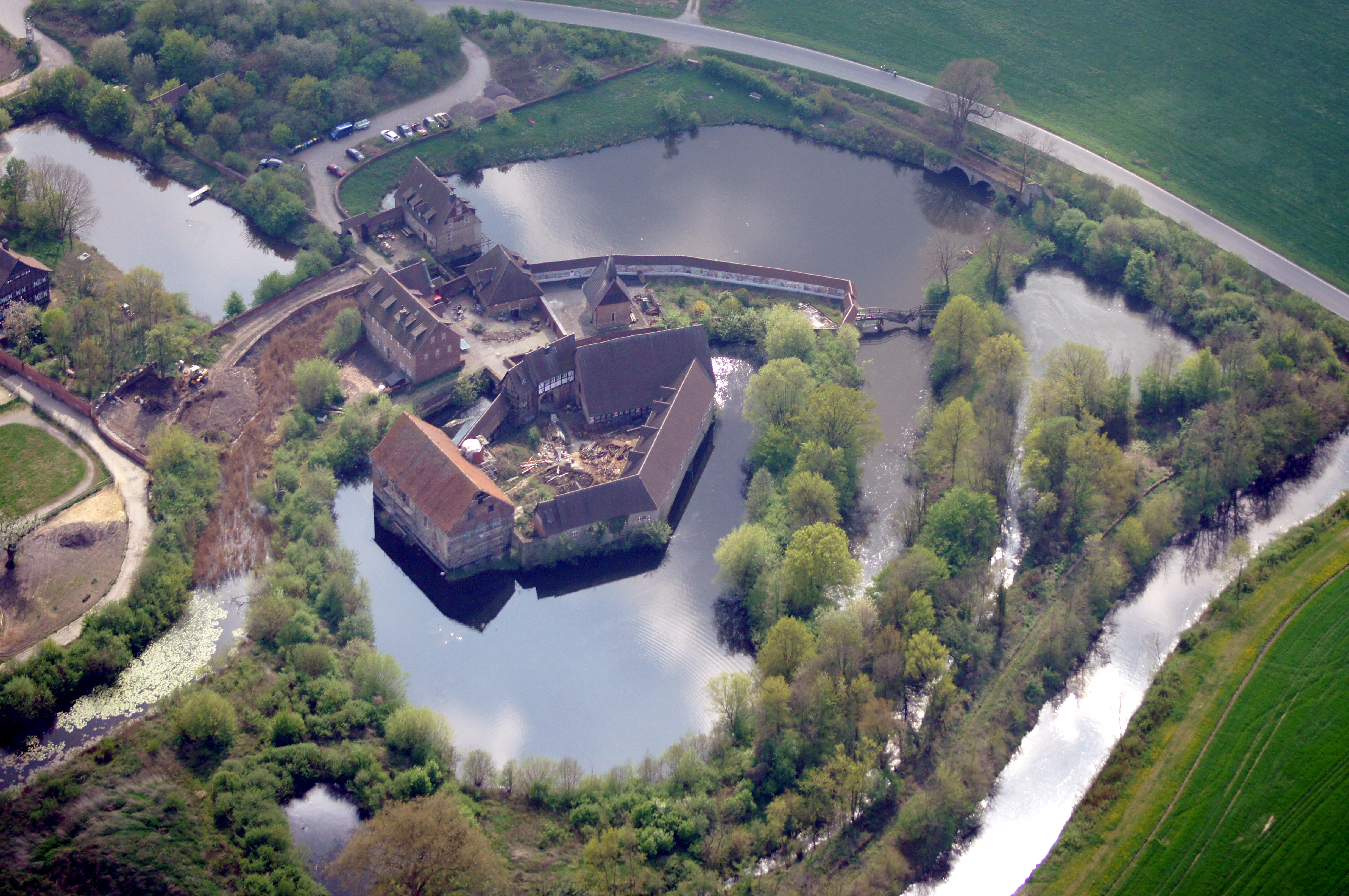 Burg Kakesbeck bei Lüdinghausen, NRW, Deutschland.